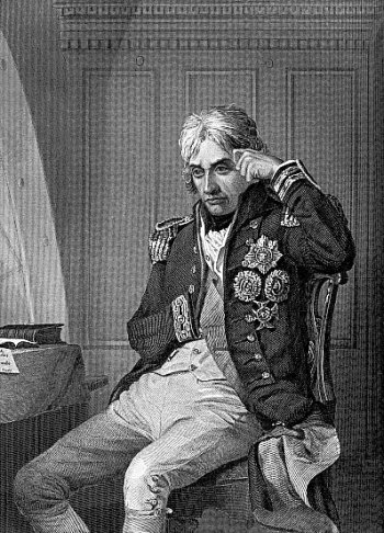 Horacio Nelson Horatio Nelson